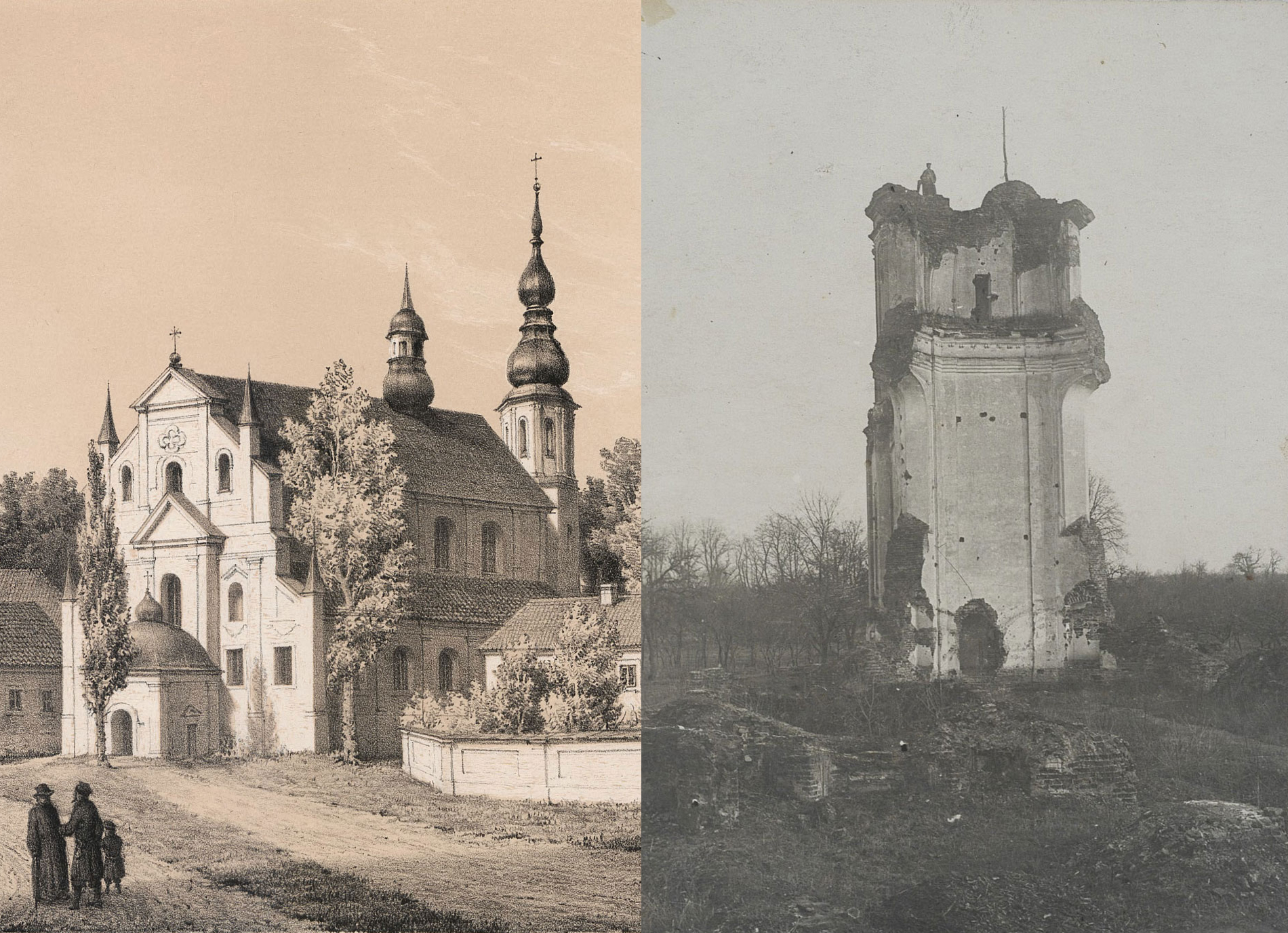 Беларуская (тарашкевіца): Маскалізацыя (русіфікацыя) Вялікага Княства Літоўскага. Мястэчка Бяроза Картуская Берасьцейскага павету. Касьцёл Сьвятога Крыжа, помнік архітэктуры барока: аўтэнтычны выгляд (налева) і па руйнаваньні расейскімі ўладамі (направа)